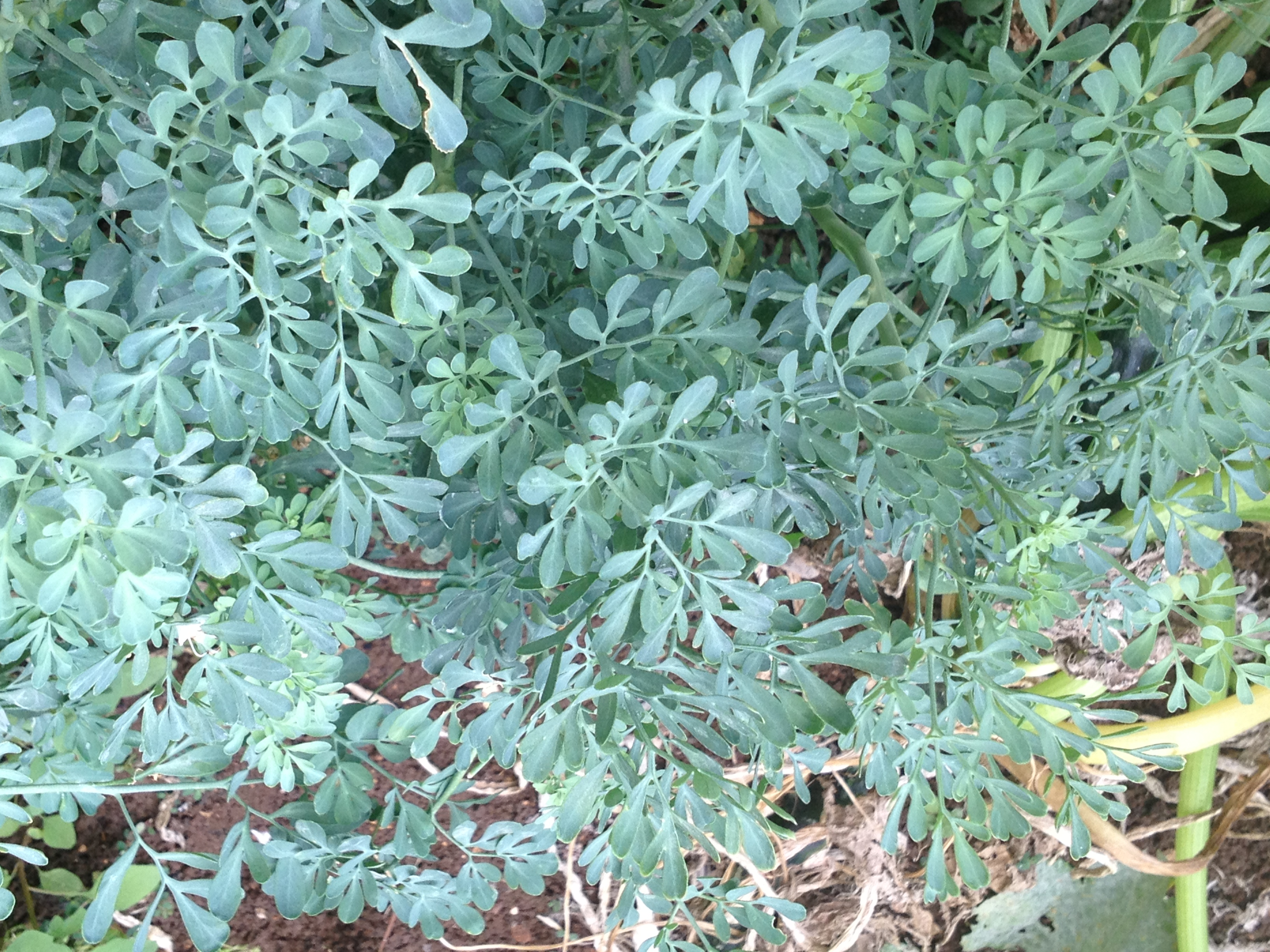 צמח פיגם